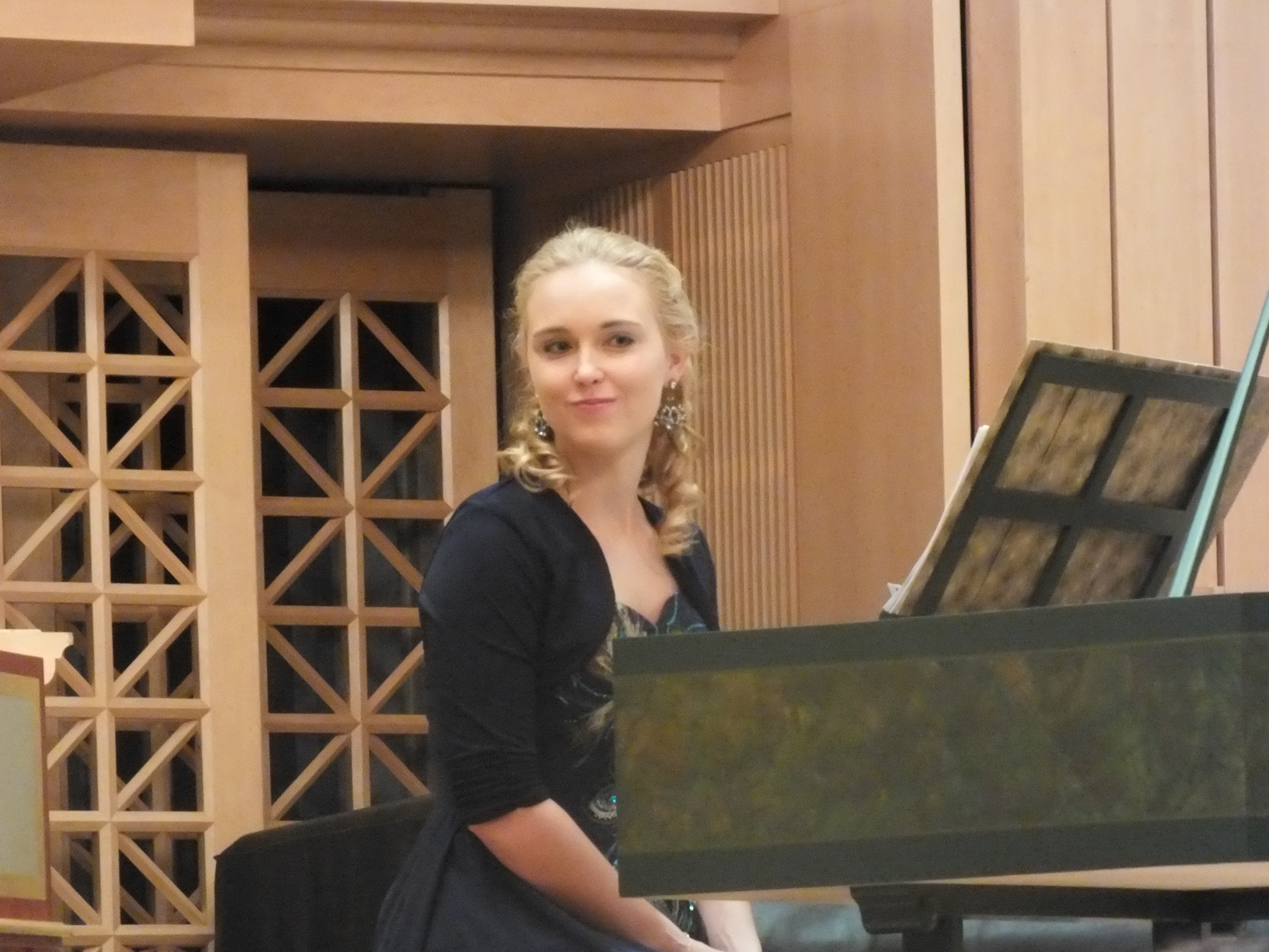 Doktorský koncert, AMU Praha